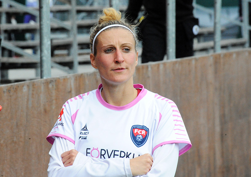 Anja Mittag, FC Rosengård